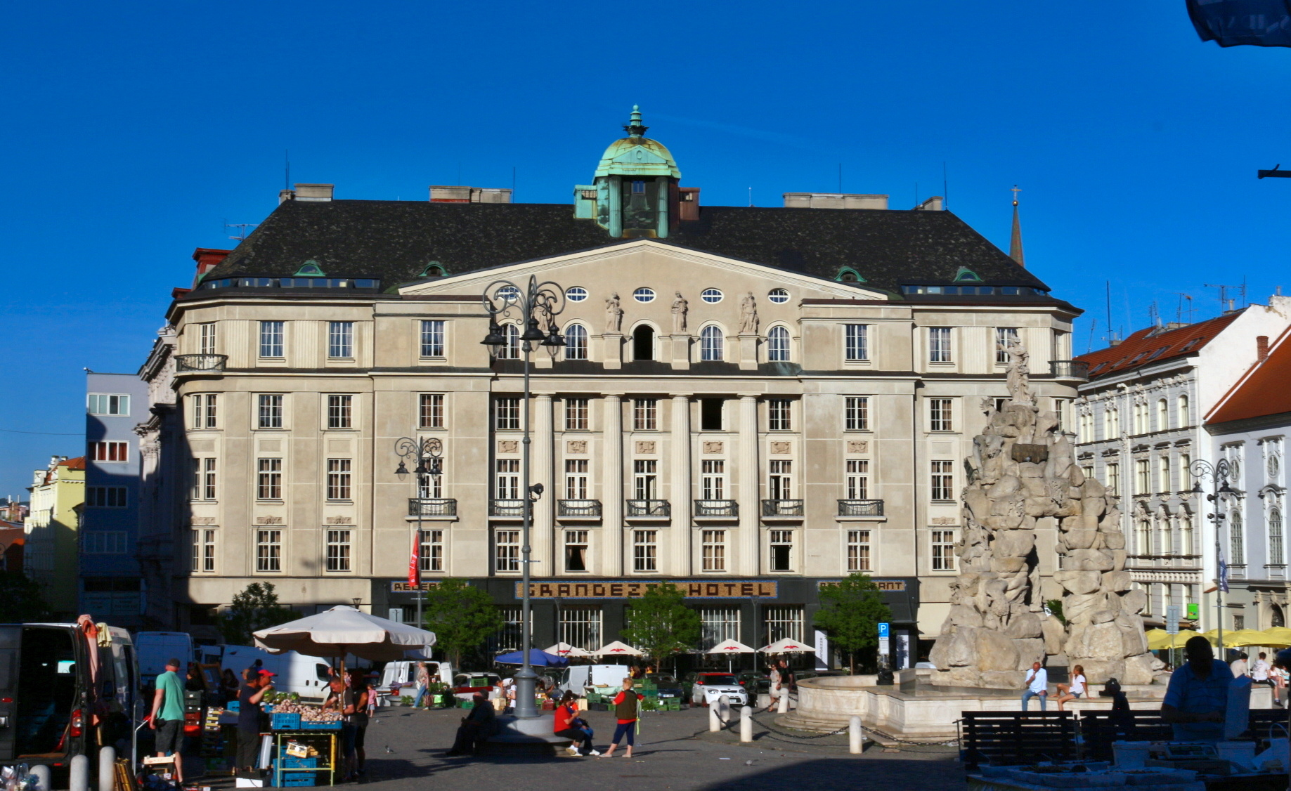 Hotel Grandezza (Brno), někdejší Cyrilometodějská záložna